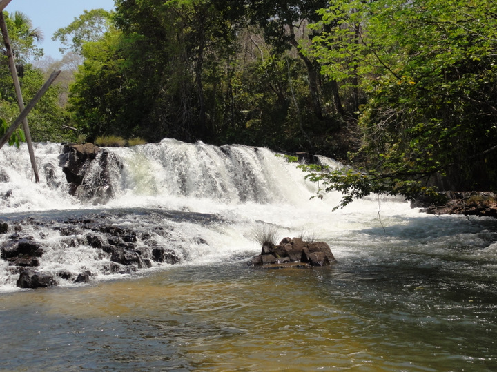 É muito bonita